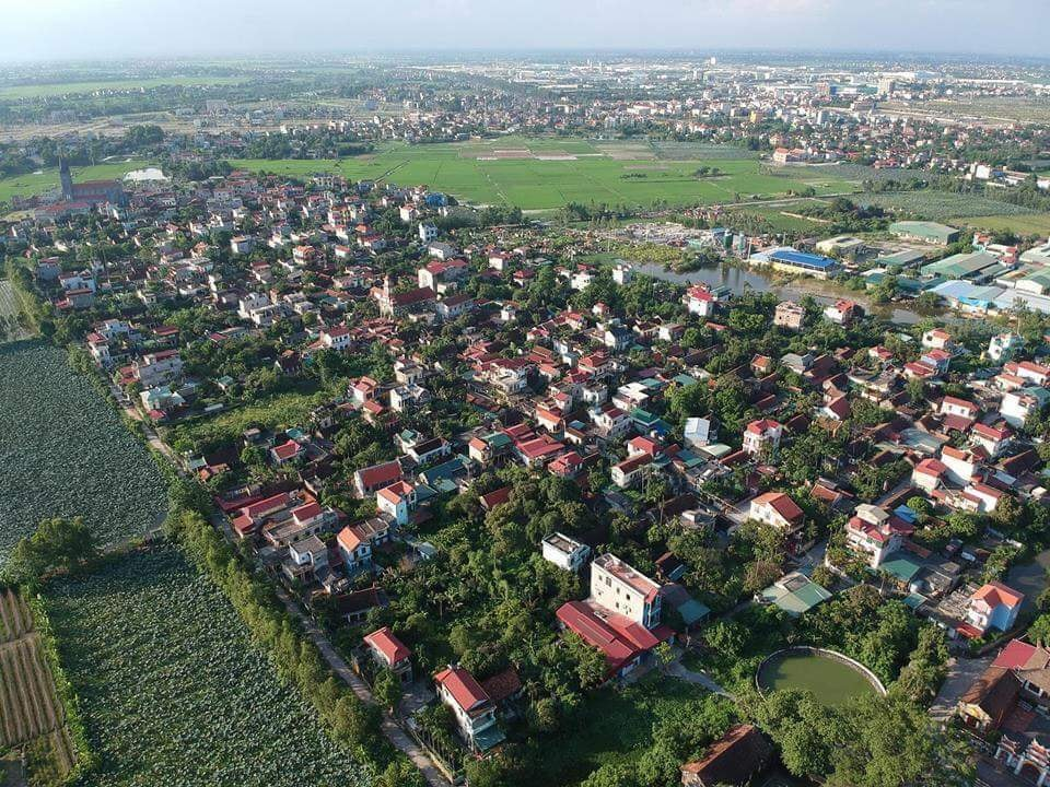 Ngọc Động tiến lên đô thị